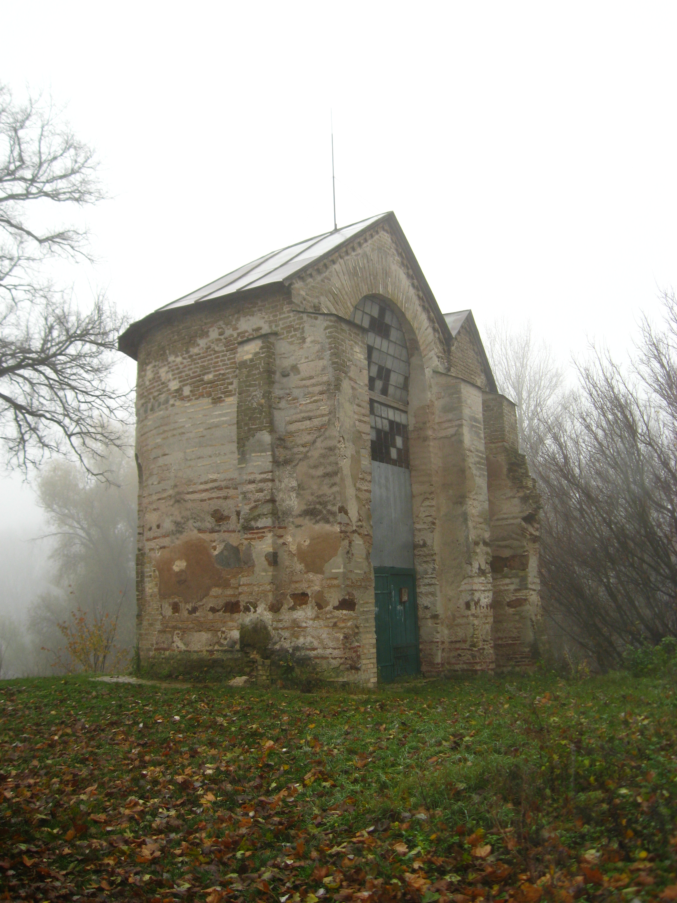 Церква святого Михаїла (Остер) - Юр'єва божниця. Пам'ятка давньоруського зодчества XI ст., розташована при в'їзді в Остер з півдня на високому пагорбі/